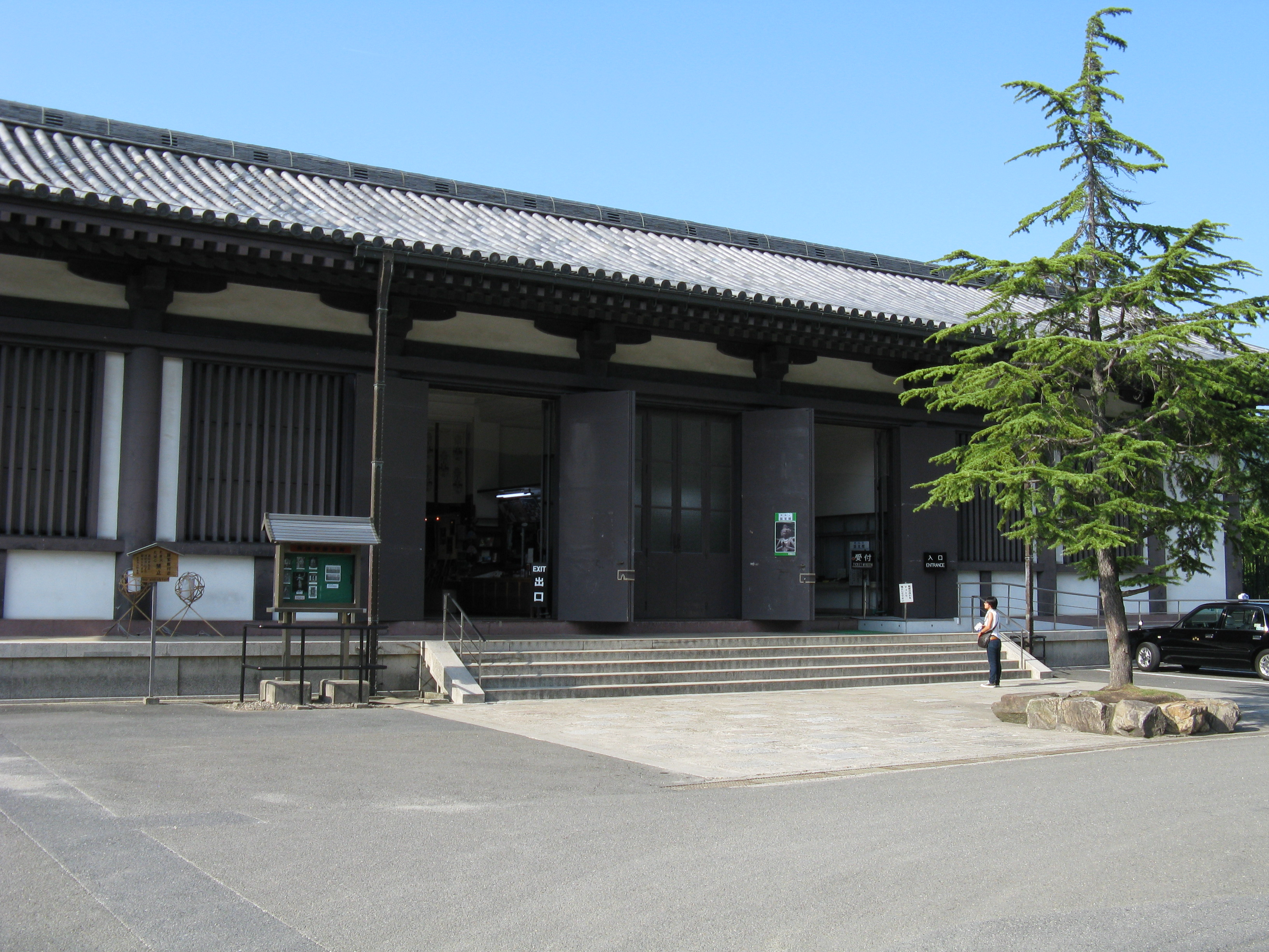 興福寺 国宝館